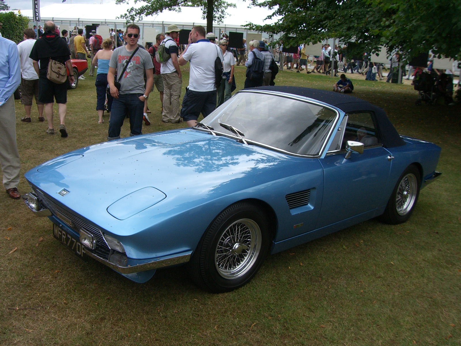 1967 TVR Trident Roadster